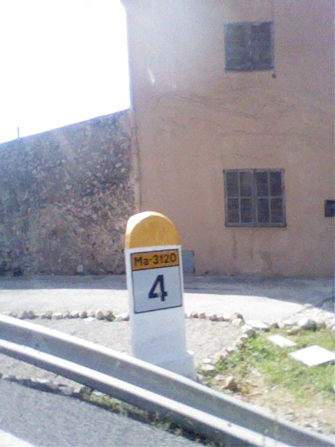 Mojón kilométrico en la carretera Ma-3120